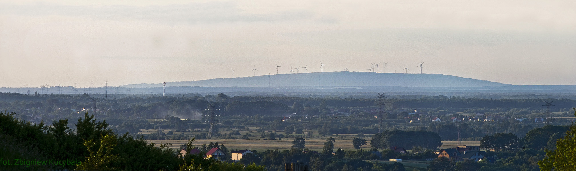 Góra Kamieńska z Mstowa k/Częstochowy